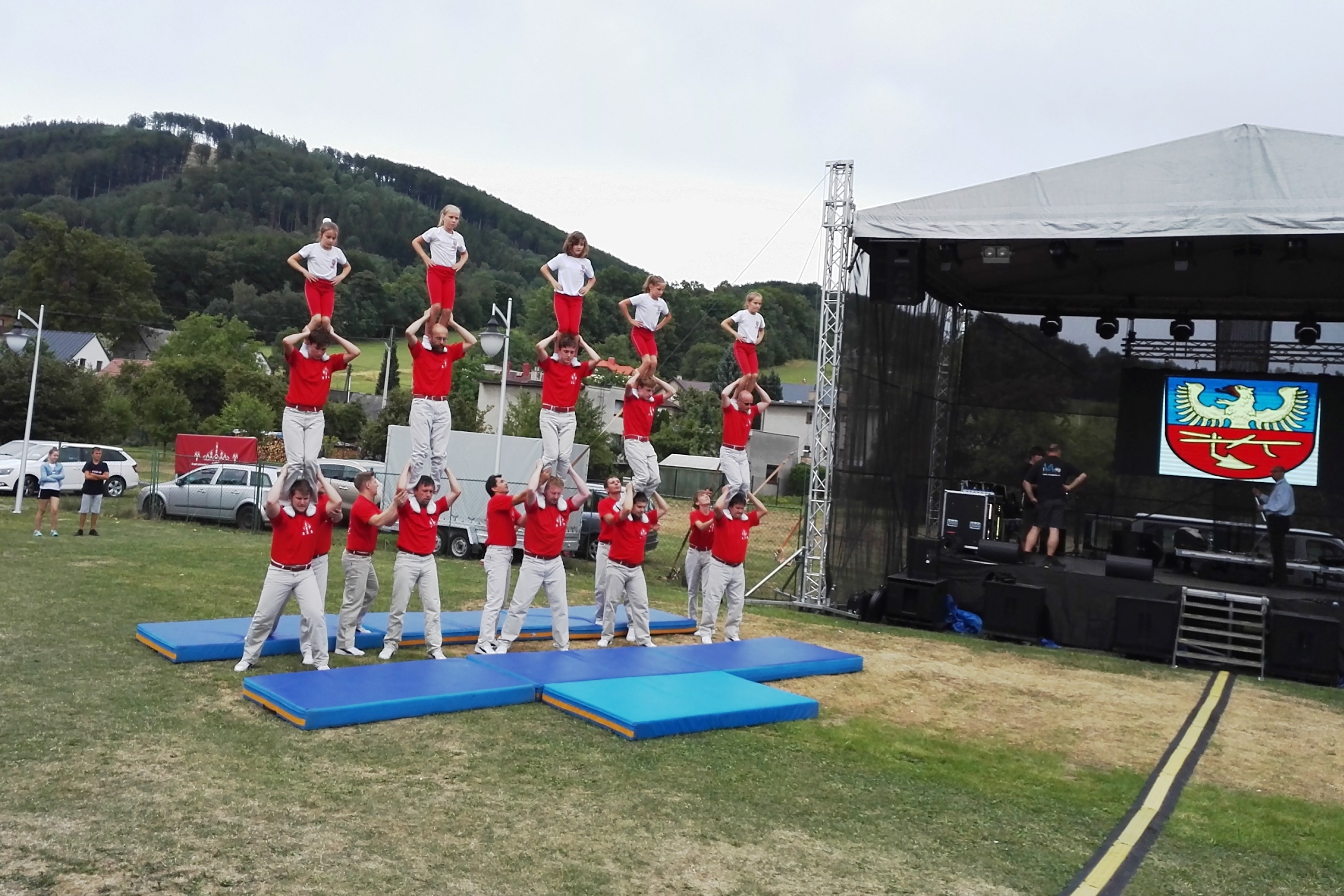 Gymnasté MK PZKO Vendryně; vystoupení v Komorní Lhotce (2019)